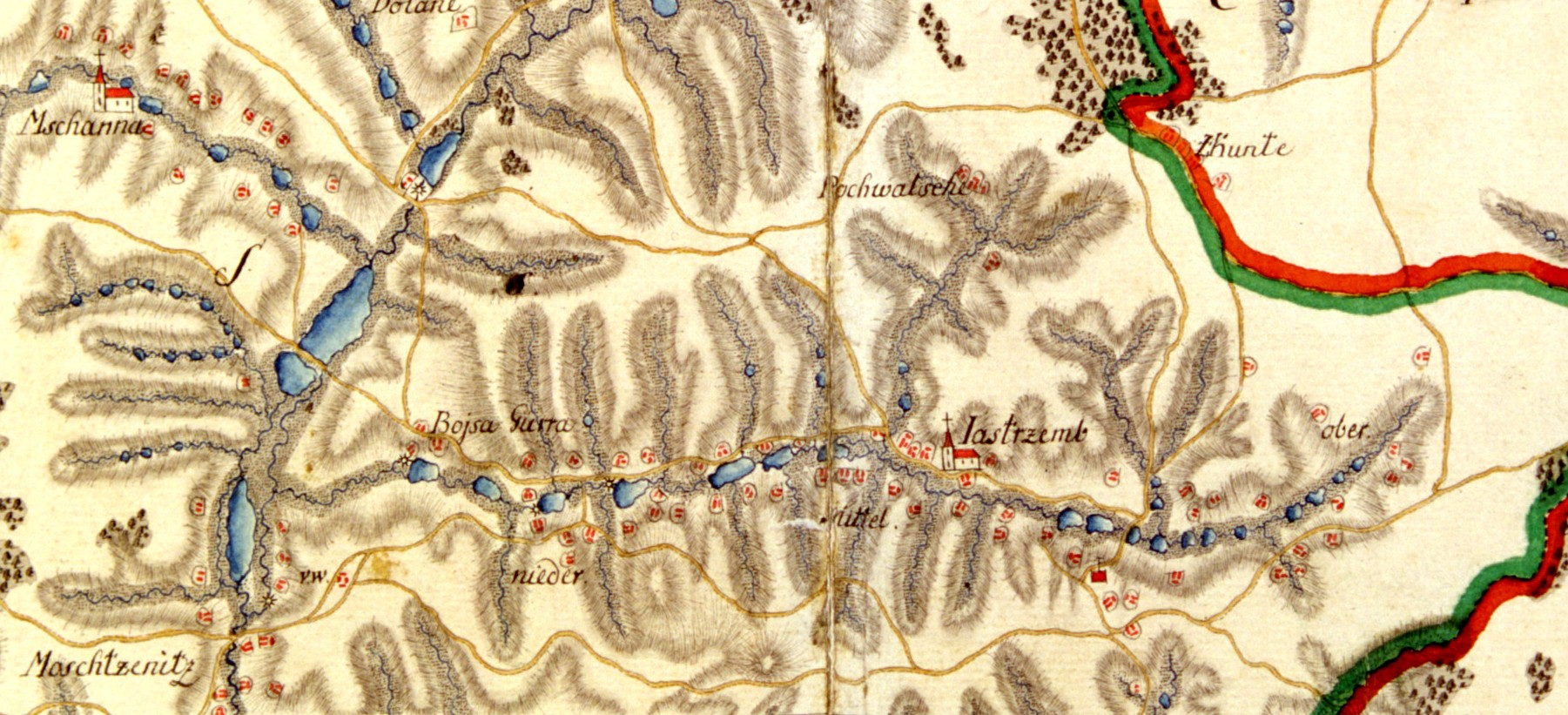 Fragment mapy Wodzisławskiego Państwa Stanowego wykonanej przez Christiana Friedricha von Wrede w latach 1747-1753.